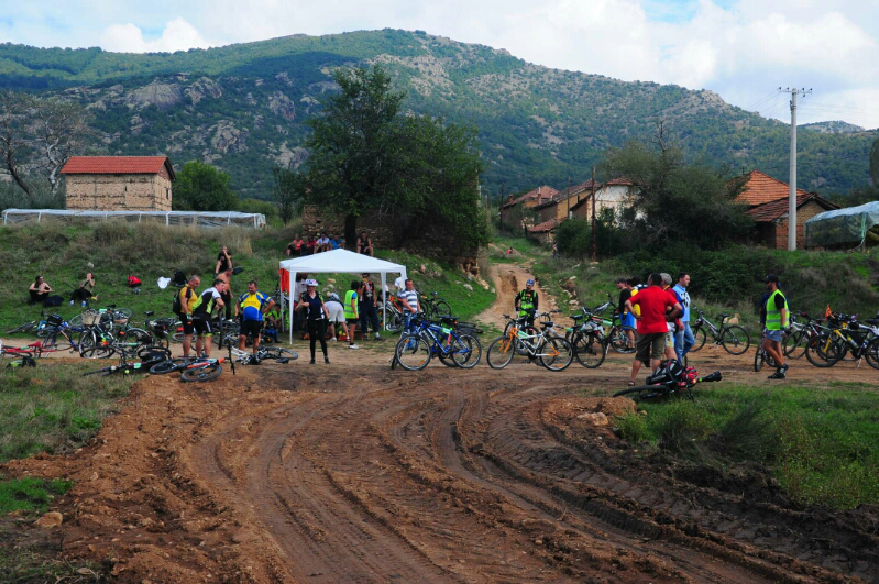 Велосипедска прошетка - Културното наследство низ Прилепското Поле, 2014